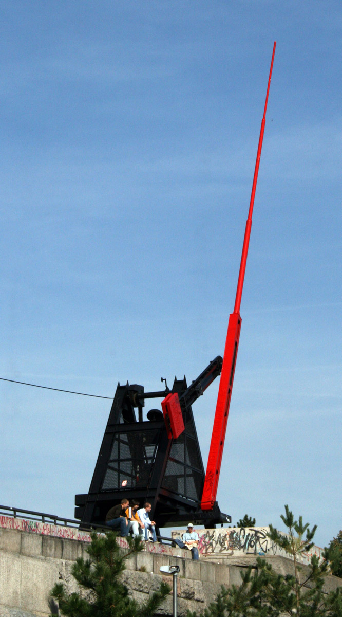 Prague Metronom (2007)